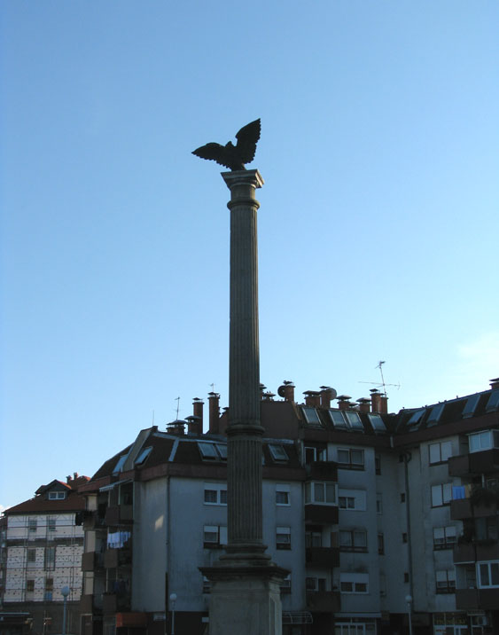 Spomenik na Oro trgu u Oroslavju, Zagrebačka županija